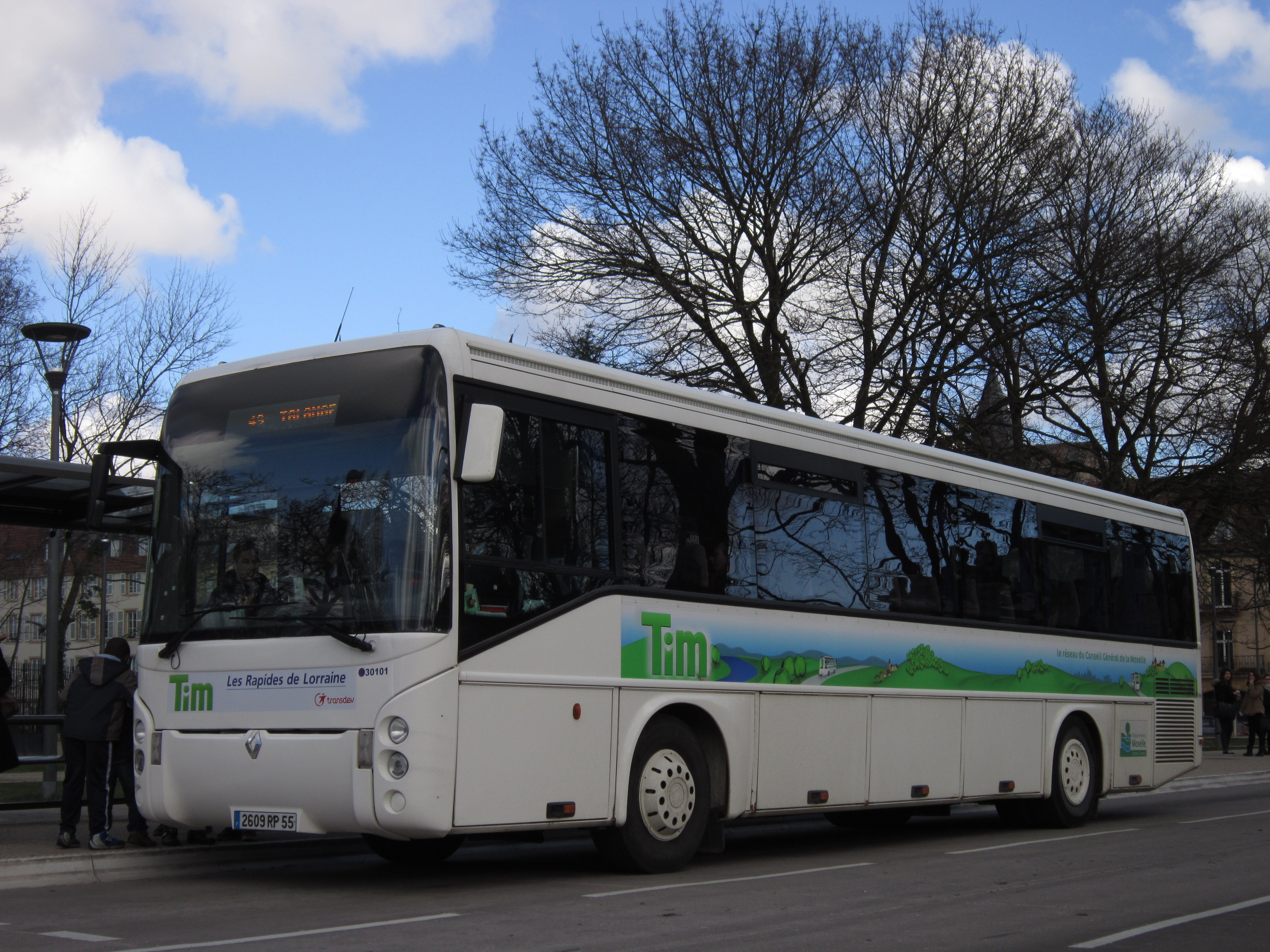 Renault Arès sur le réseau des Transports Interurbains de la Moselle à Metz.